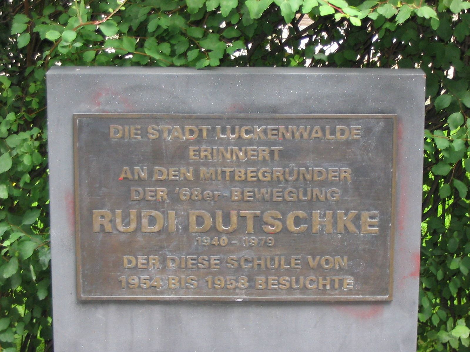 Die Gedenktafel für Rudi Dutschke vor dem Luckenwalder Gymnasium.